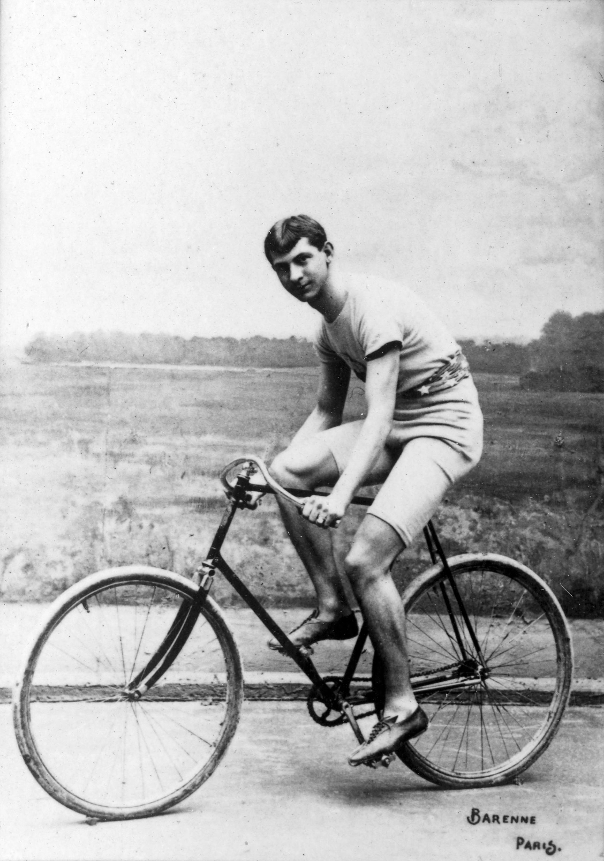 Arthur Augustus Zimmerman (* 11. Juni 1869 ; † 22. Oktober 1936), US-amerikanischer Radrennfahrer